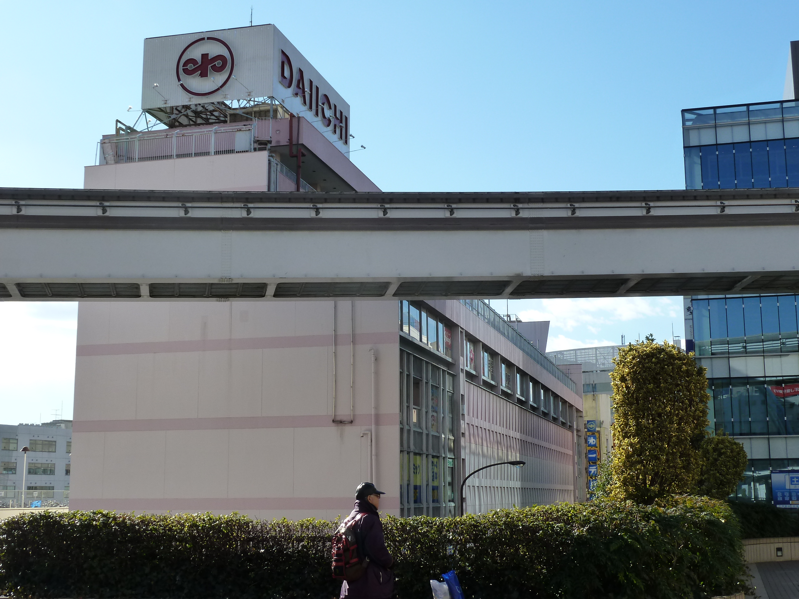 第一デパート（東京都立川市）